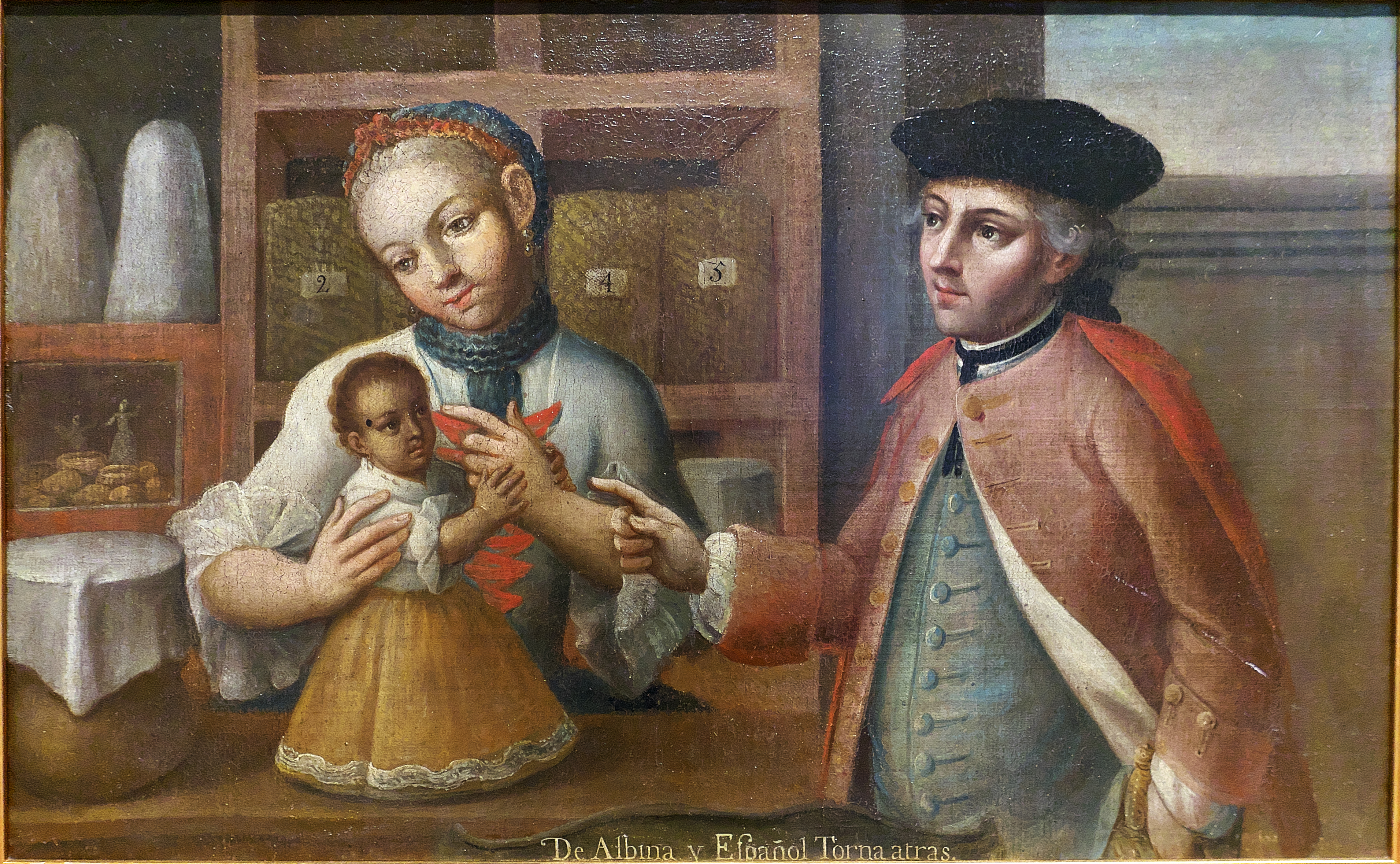 Pintura de casta, atribuida a Juan Patricio Morlete Ruiz (1710-1770)